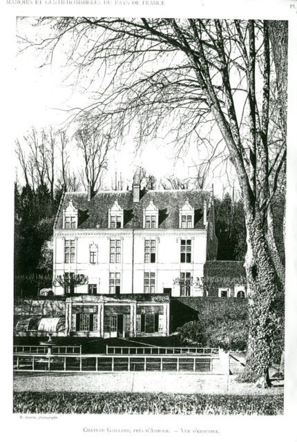 1925 chateau